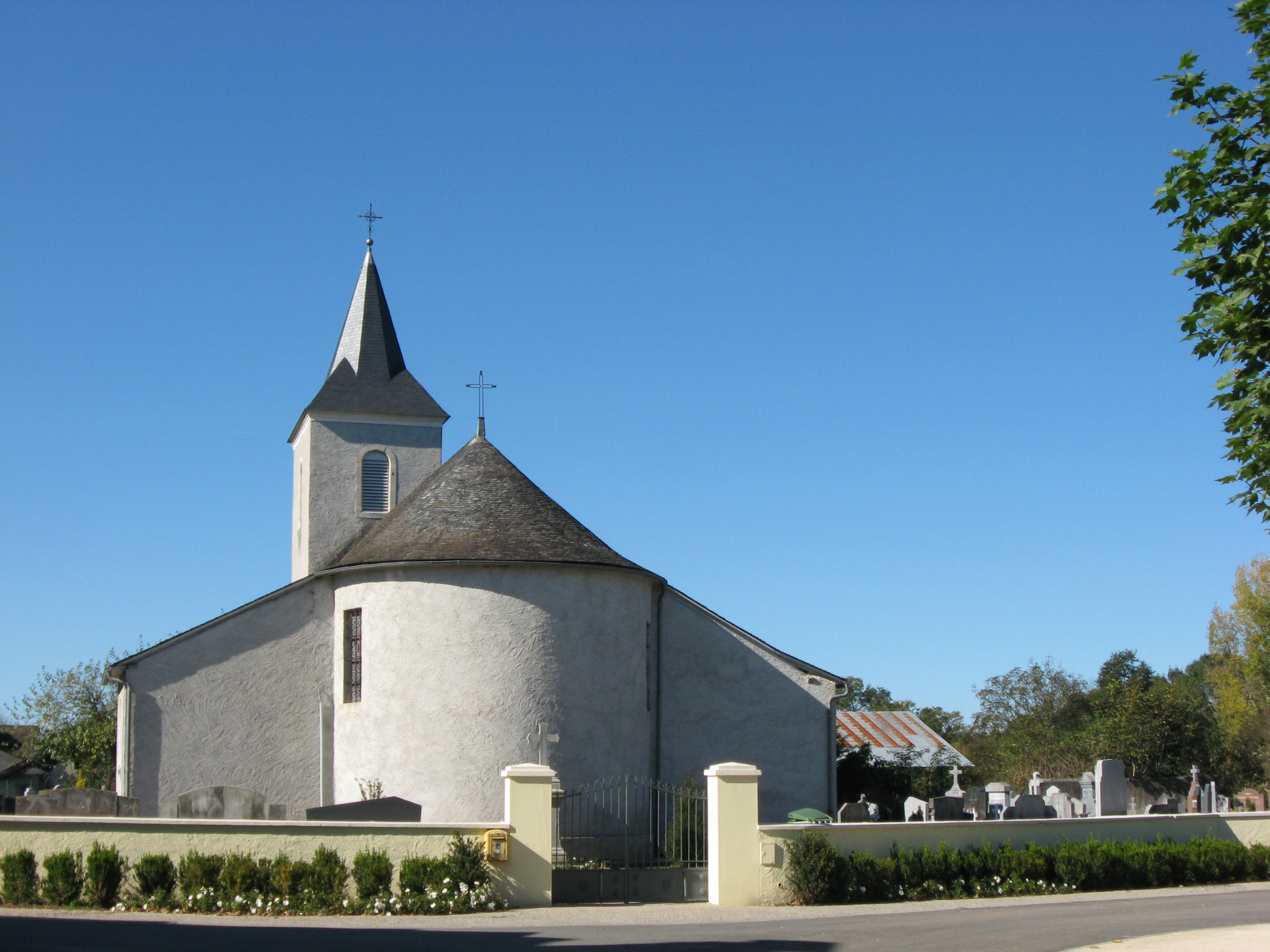 Eglise Saint Martin de Précilhon avec son cimetière (Pyrénées Atlantiques) Pyrénées).